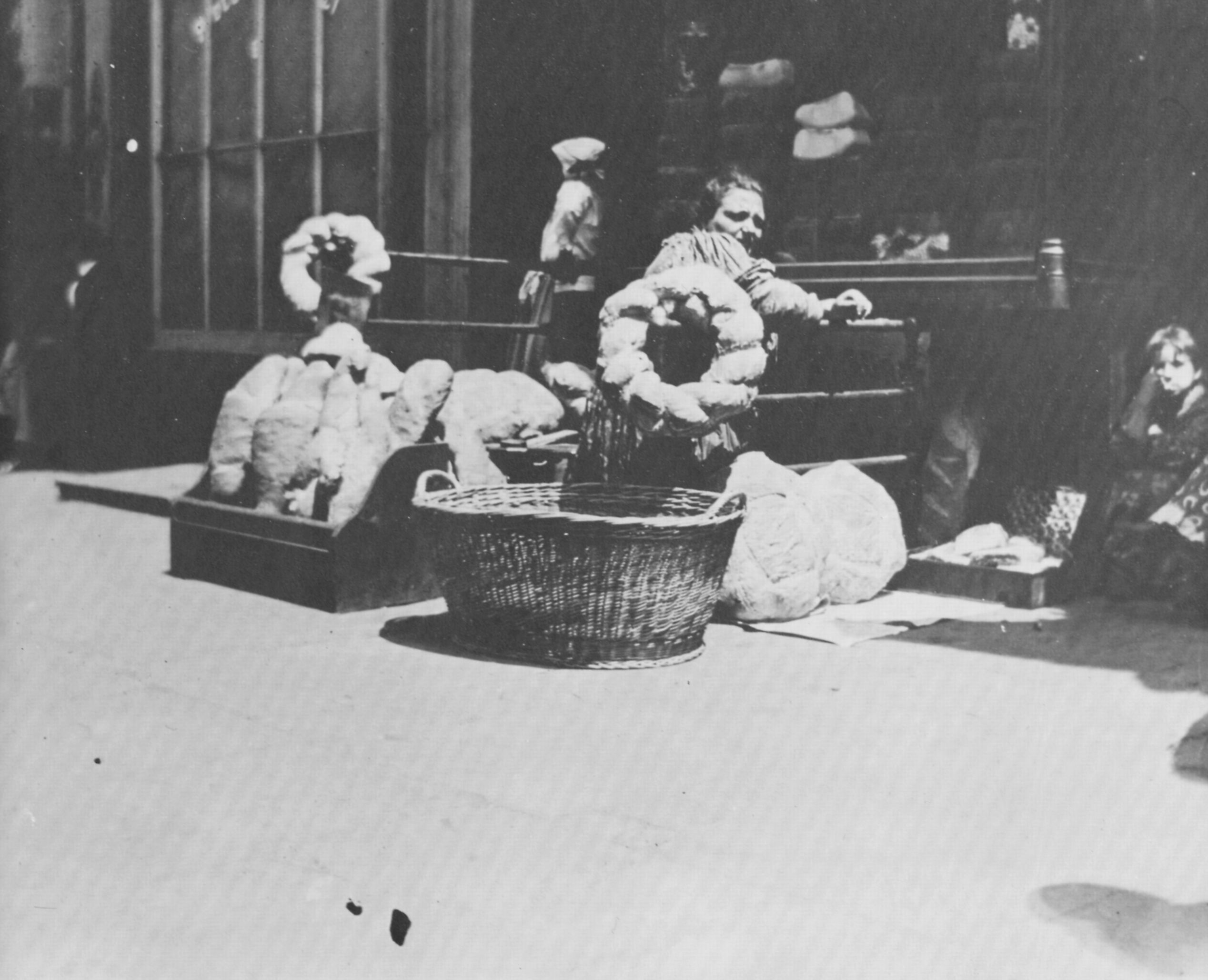 Riis, Jacob A.: Altbrot Verkäuferin